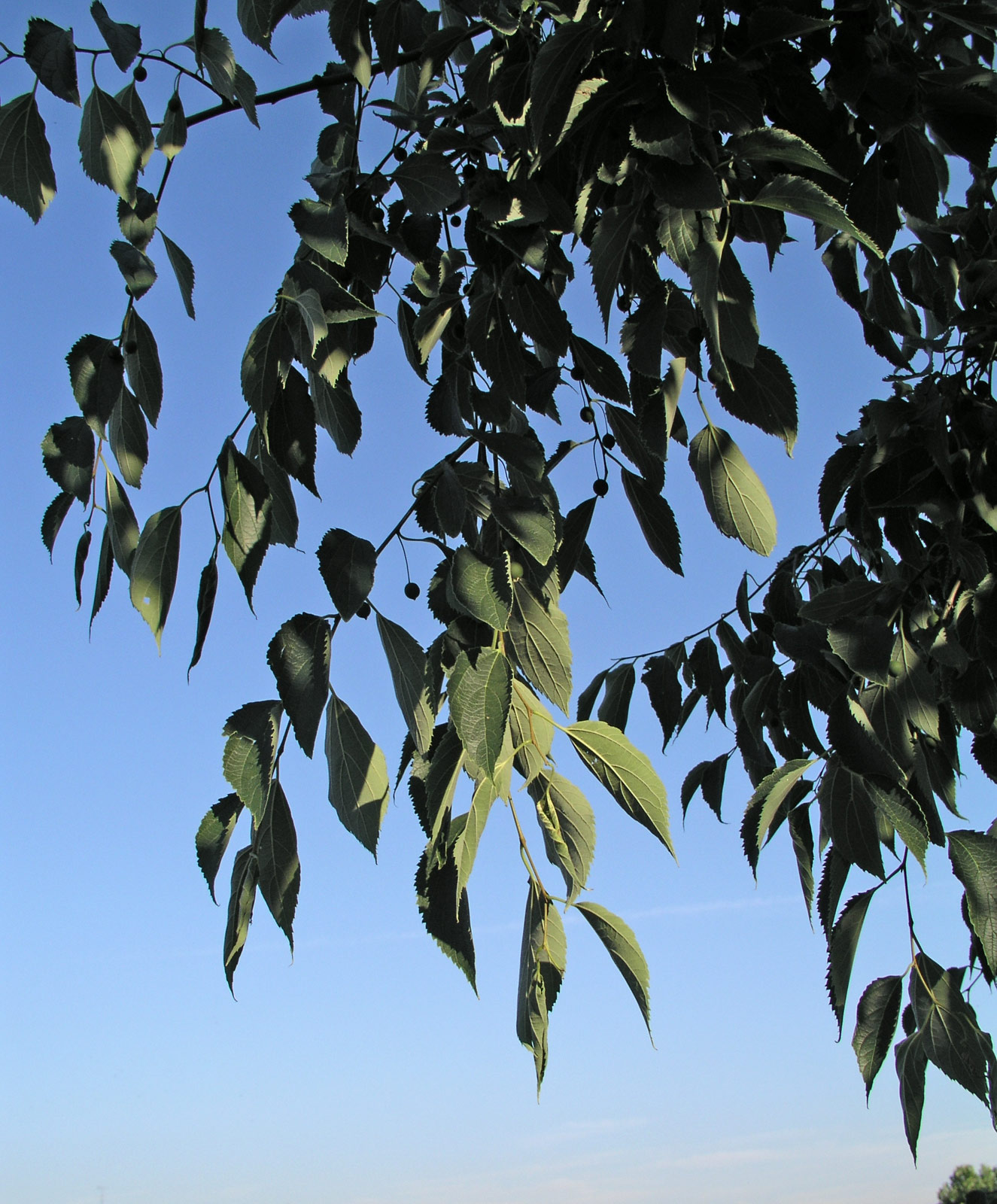 Almez (Celtis australis). Entre el parque del Oeste y el parque de La Bombilla. Madrid.